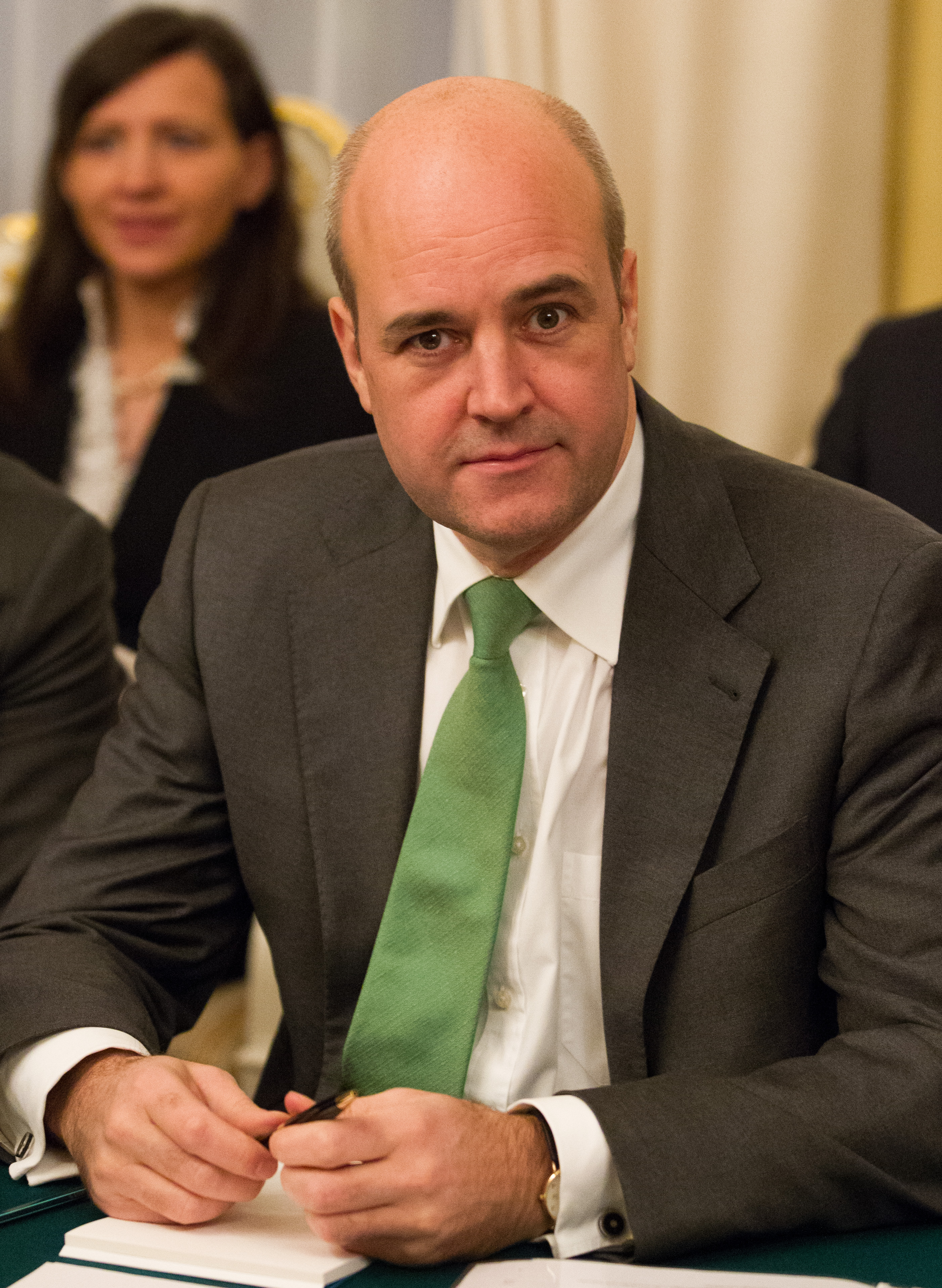 Nordisk-baltisk statsministermöte under Nordiska rådets session i Helsingfors. Fredrik Reinfeldt